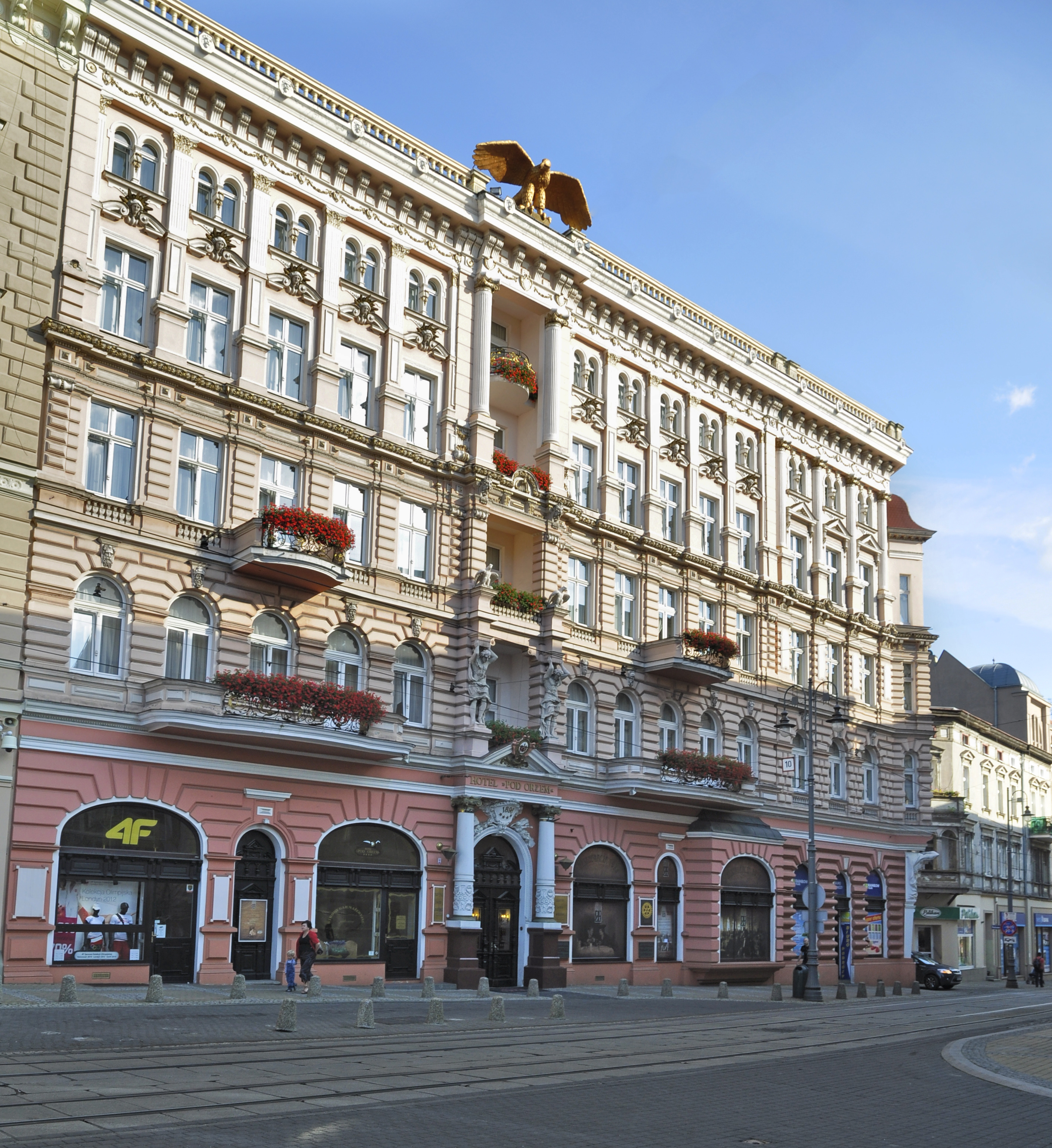 Hotel „Pod Orłem”, 1893-1896, Bydgoszcz